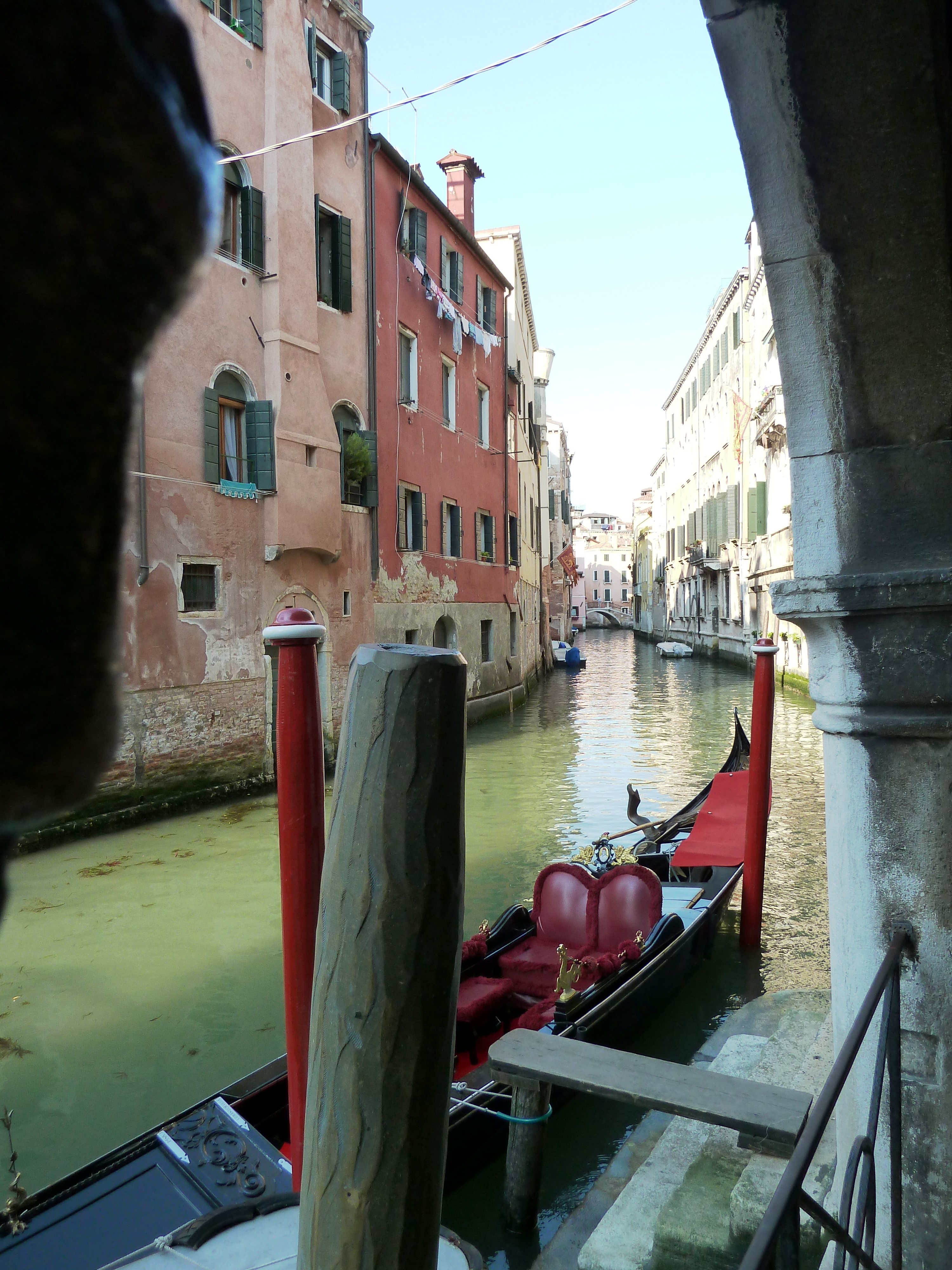 Rio dei Santi Apostoli (Venice)